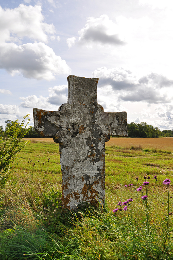 Hans Kroks kors i Dalhem (RAÄ-nummer Dalhem 45:1 ), Gotland. Lämningstyp "Minnesmärke", "Minnskors"